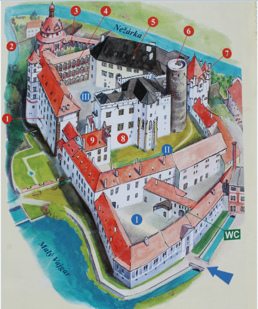 Zámek Jindřichův Hradec - plan